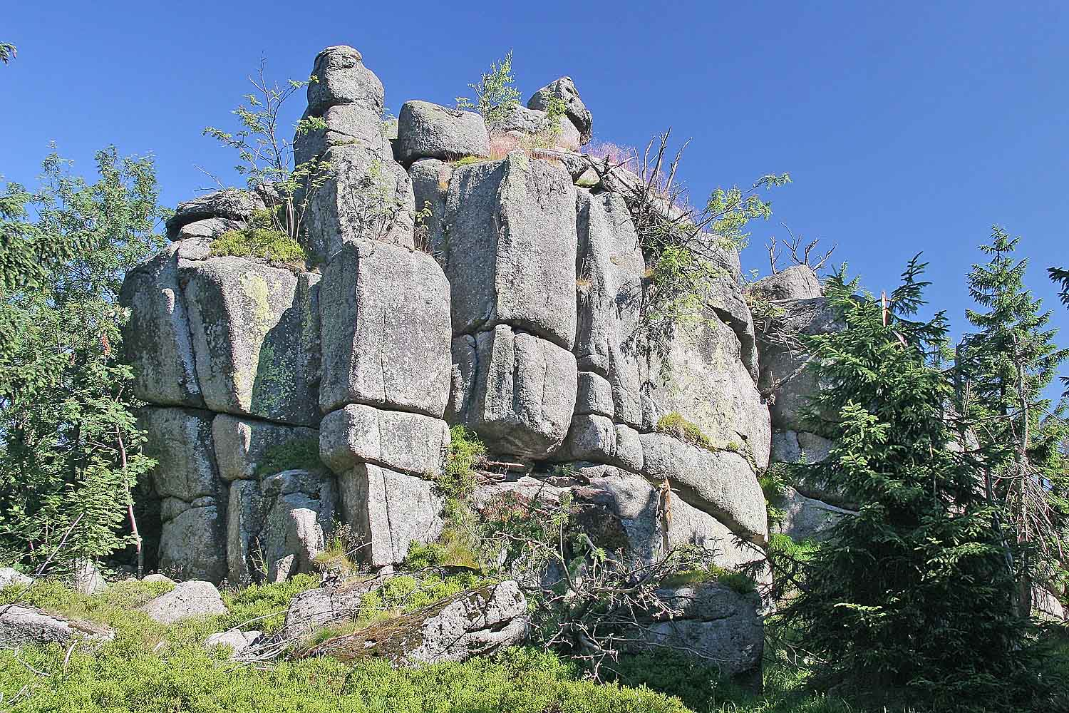 Jizerské hory - Sněžné věžičky, Jizera Mountains, district Liberec, Czech Republic autor: Prazak date: 19. 7. 2006